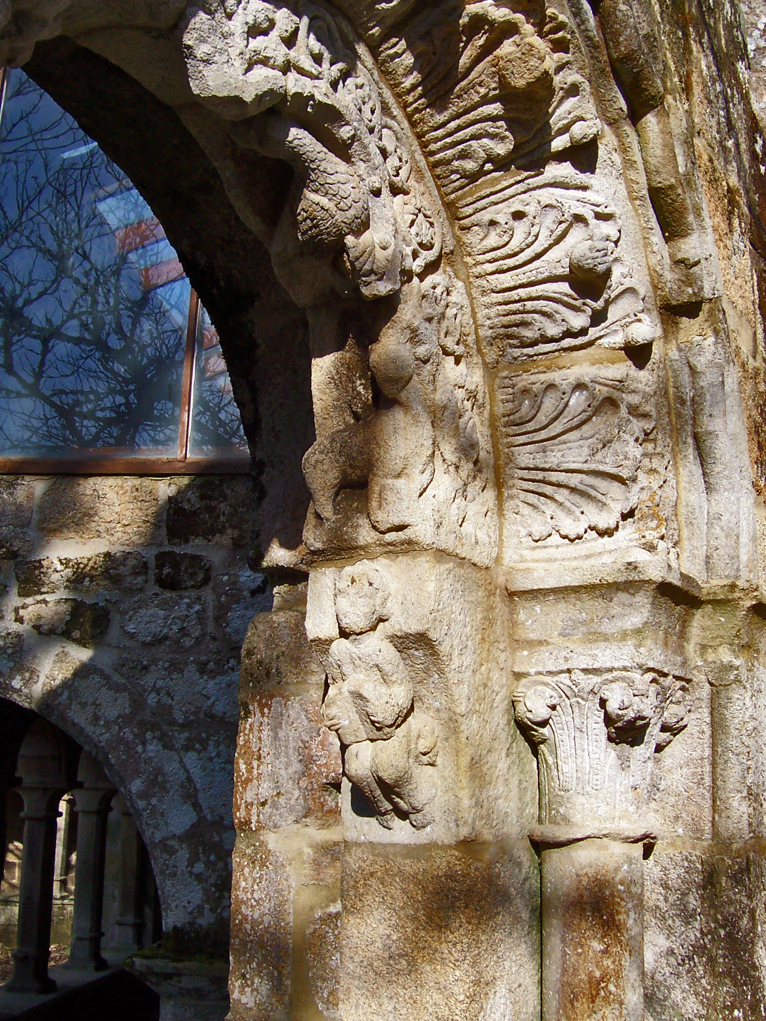 Mosteiro de Santa Cristina de Ribas de Sil